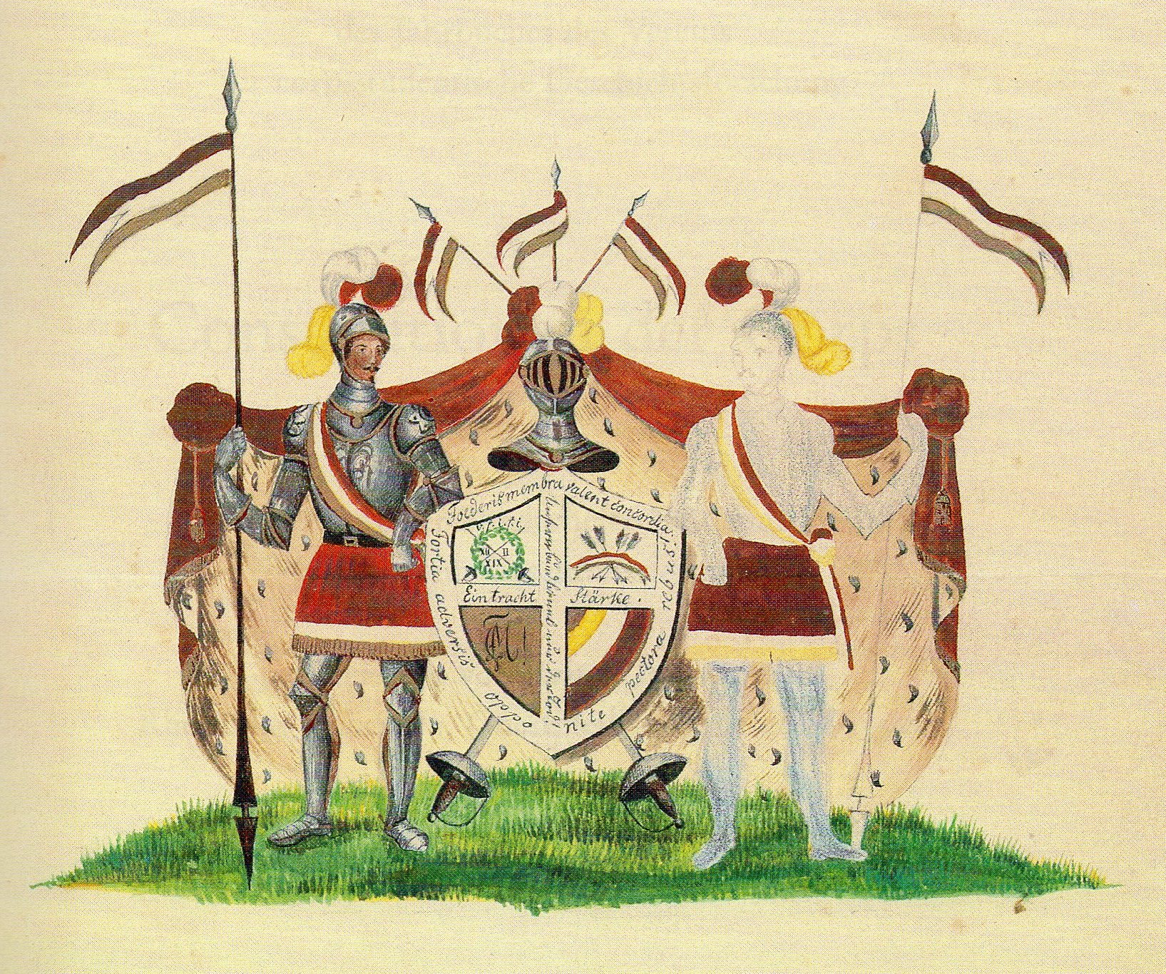 Ritterwappen der Landsmannschaft (Corps) Marchia II im Hallenser Senioren-Convent (Friedrichs-Universität Halle)